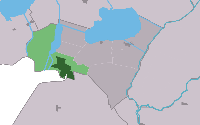 Kaartsje fan himrik fan Lemmer